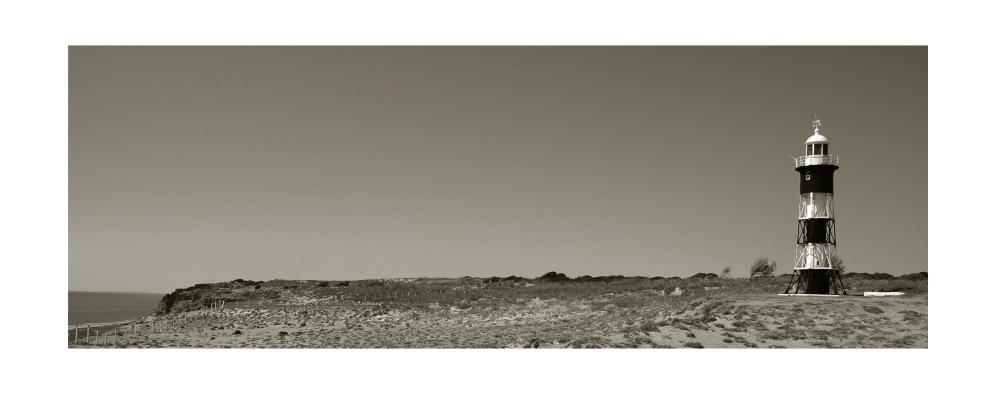 farol de ponta do mel, ponta do mel, Rio Grande do Norte, Brasil